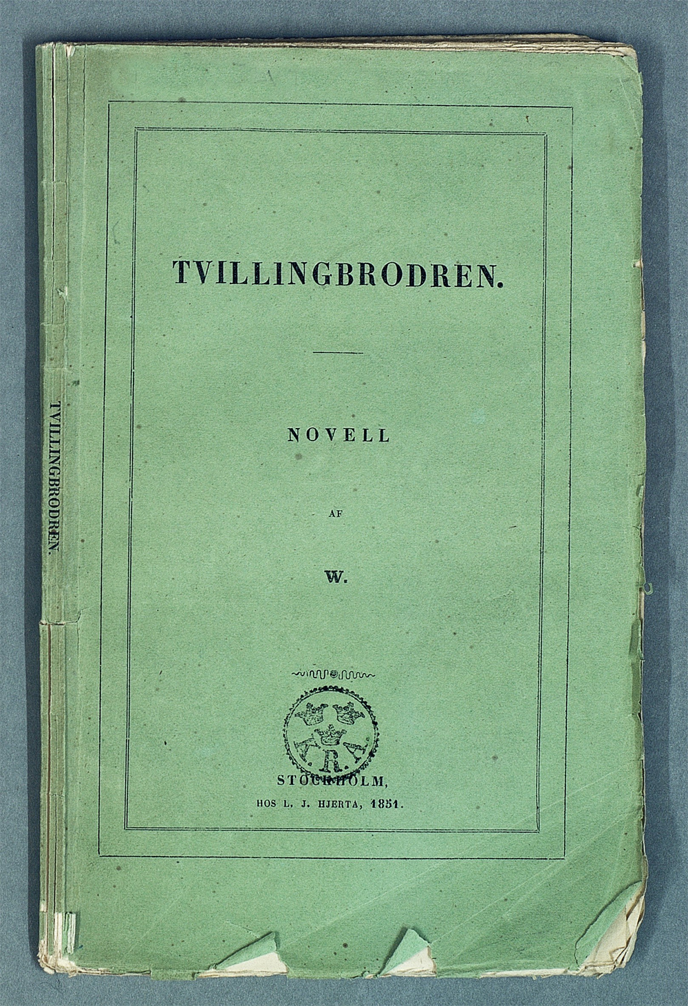 Bokomslag: Wendela Hebbe: Tvillingbrodern